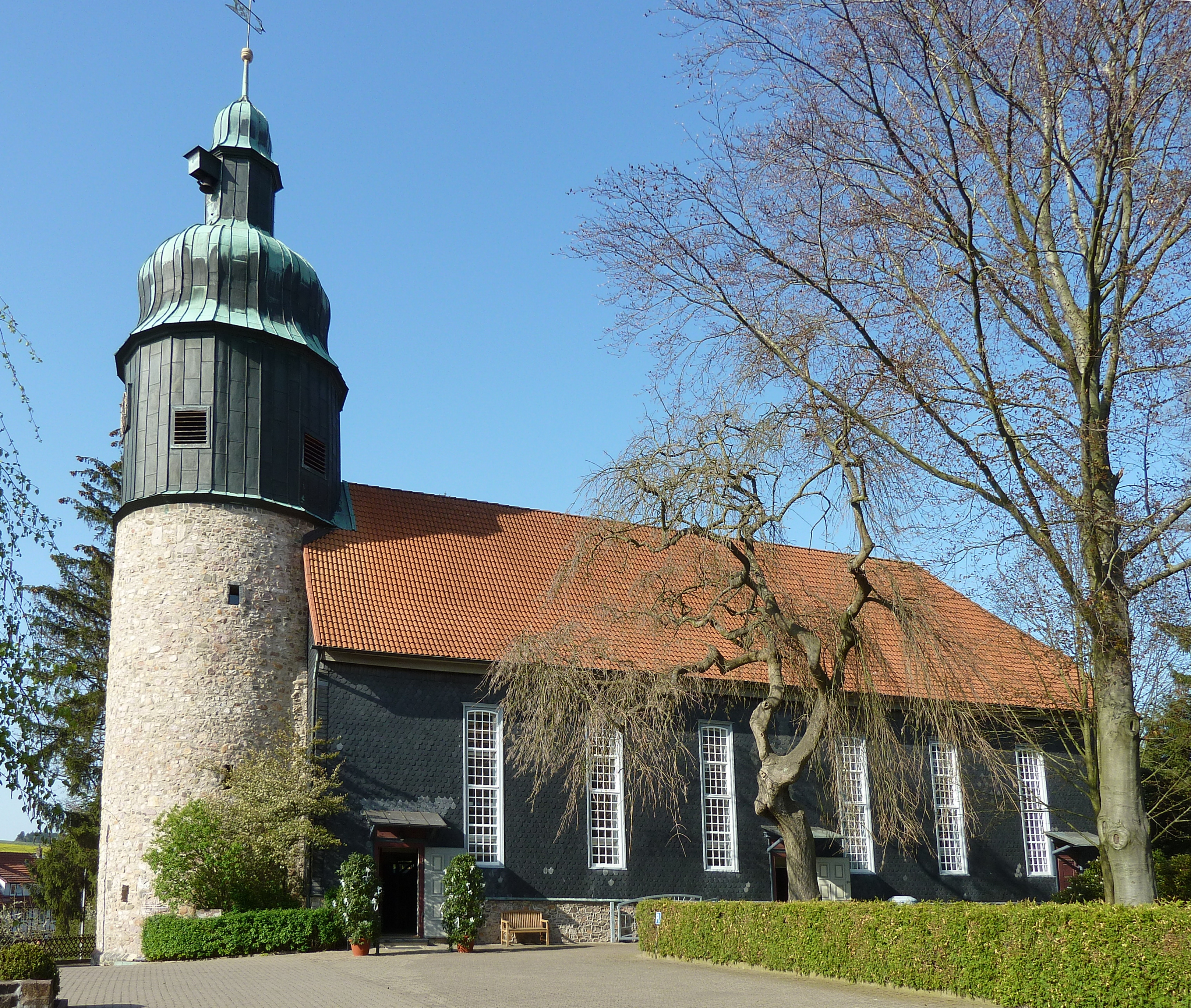 Ev.-luth. Kirche St. Pankratius in Hattorf am Harz, Landkreis Osterode, Niedersachsen. Turm als Wehrturm einer mittelalterlichen Wehr- und Fliehburg im 10./11. Jahrhundert errichtet, Kirchenschiff in Fachwerkbauweise (mit Schieferbehang) 1756 angebaut (Quelle: Informationstafel an der Kirche)